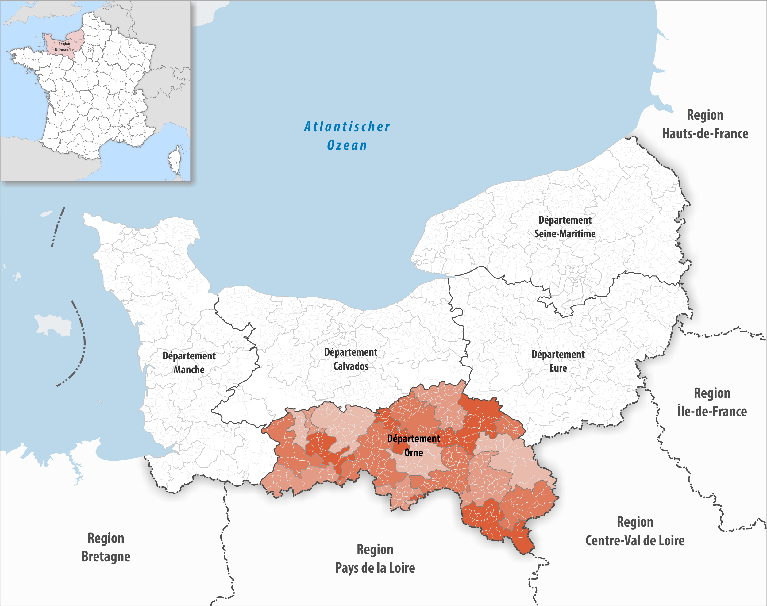 Lage des Departements Orne